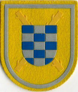 Stemma araldico del 2° Tercio "Duque de Alba" della Legione spagnola dell'esercito spagnolo